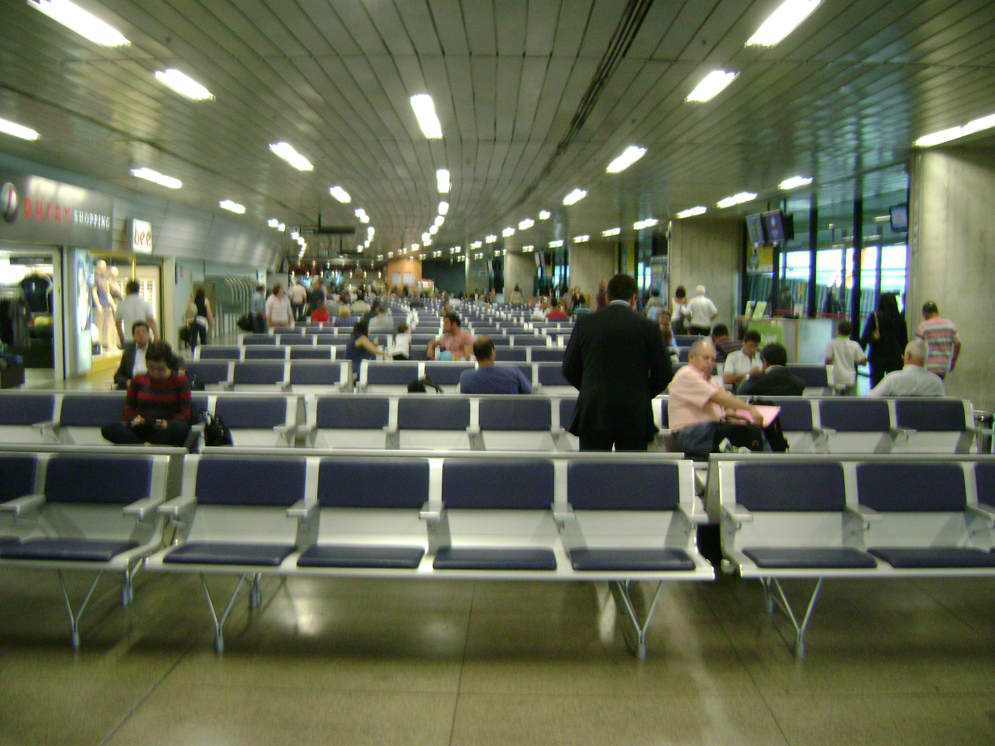 Sala no Aeroporto Internacional de Belo Horizonte-Confins, em Minas Gerais, Brasil.